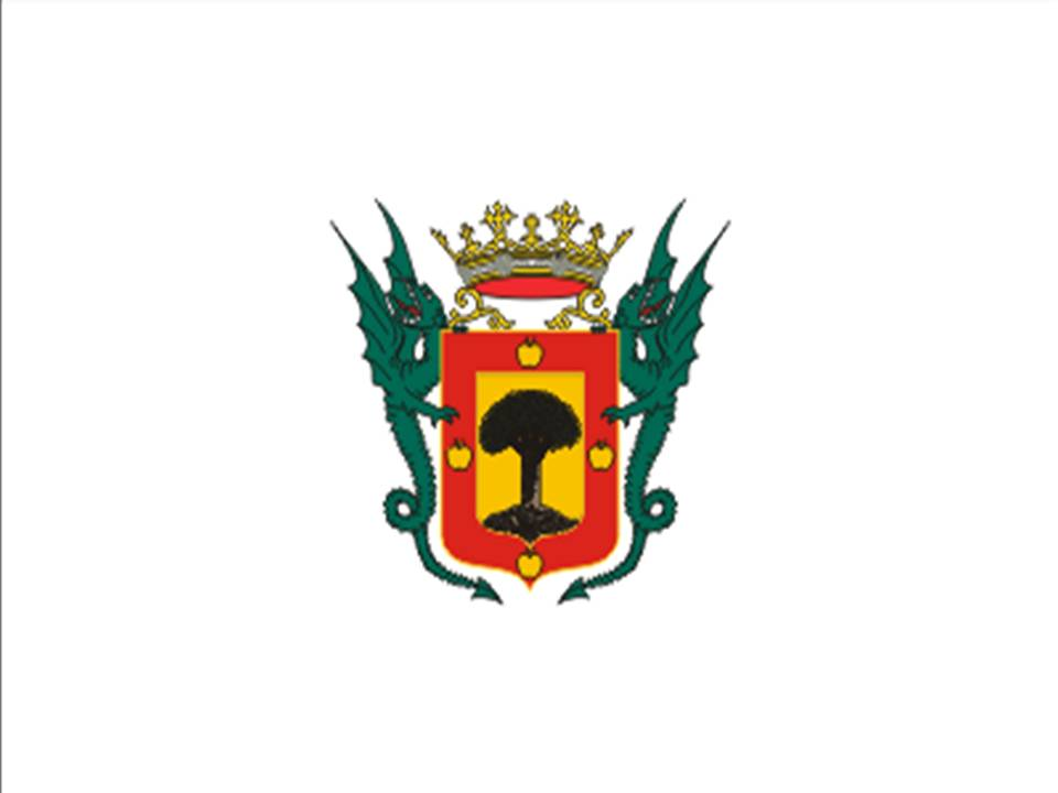 Bandera de La Orotava